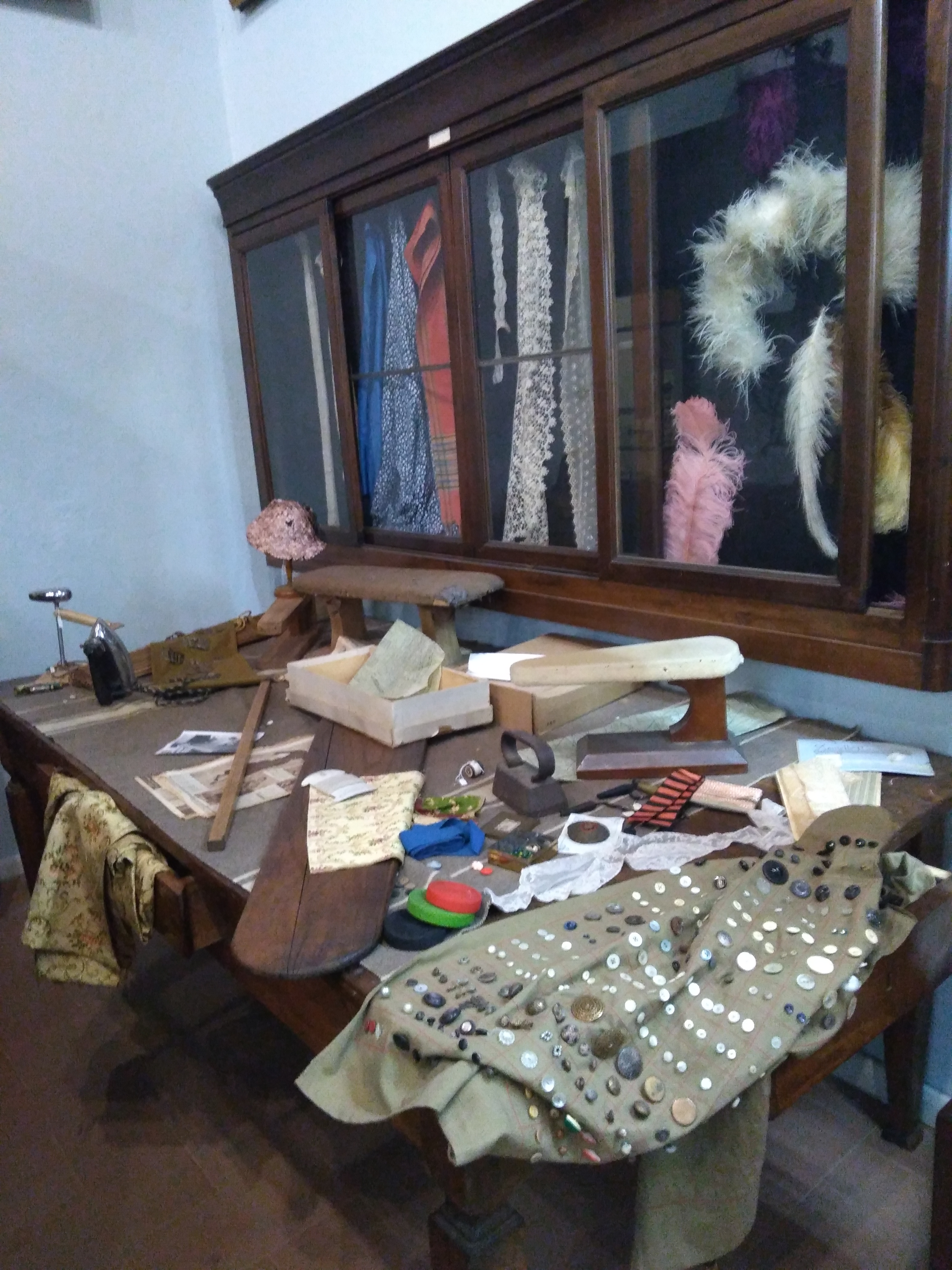 Laboratorio della modista - Museo civico archeologico etnografico Carlo Giacomo Fanchini (Oleggio)